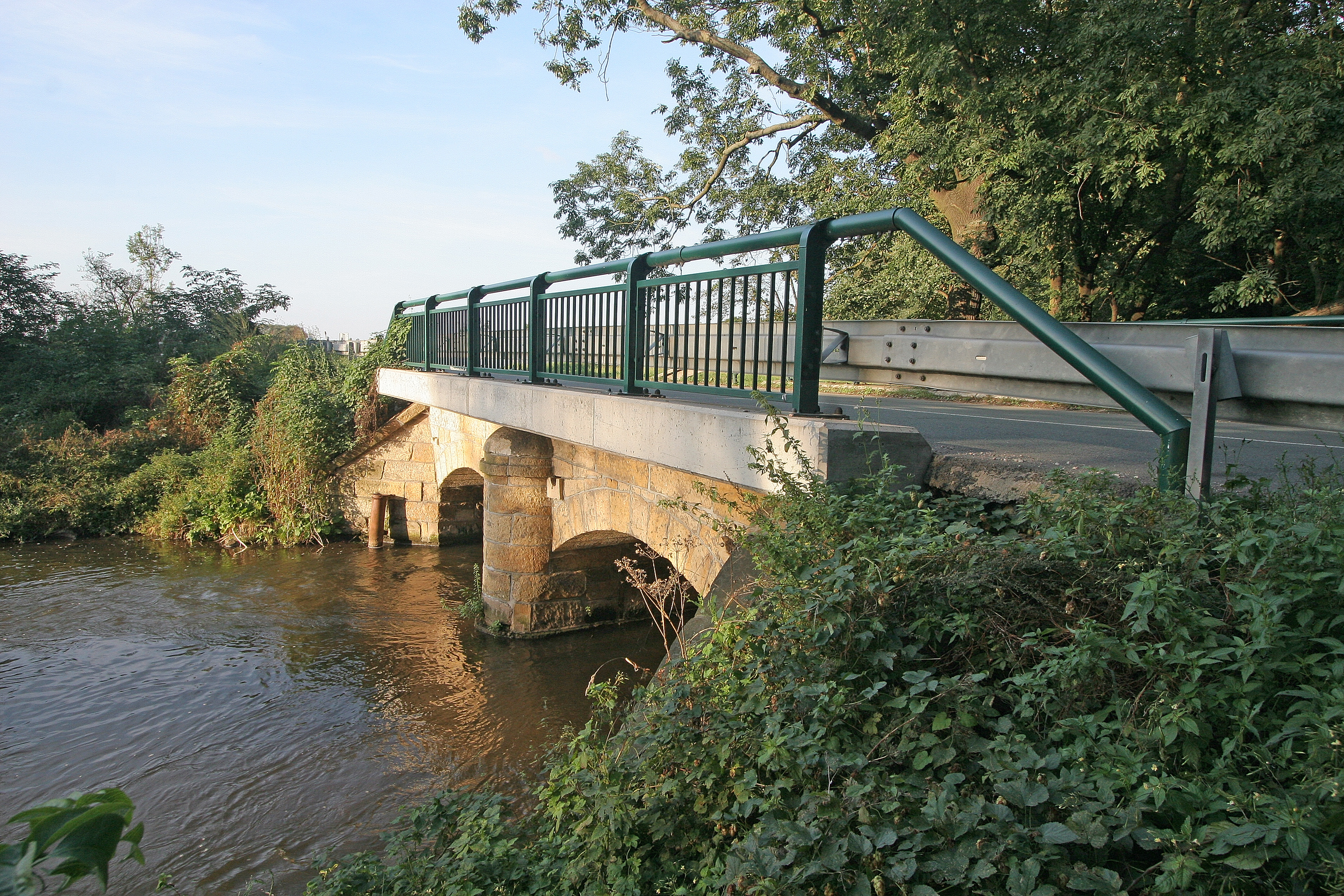 Silniční most (Staré Ždánice), přes Opatovický kanál, Staré Ždánice